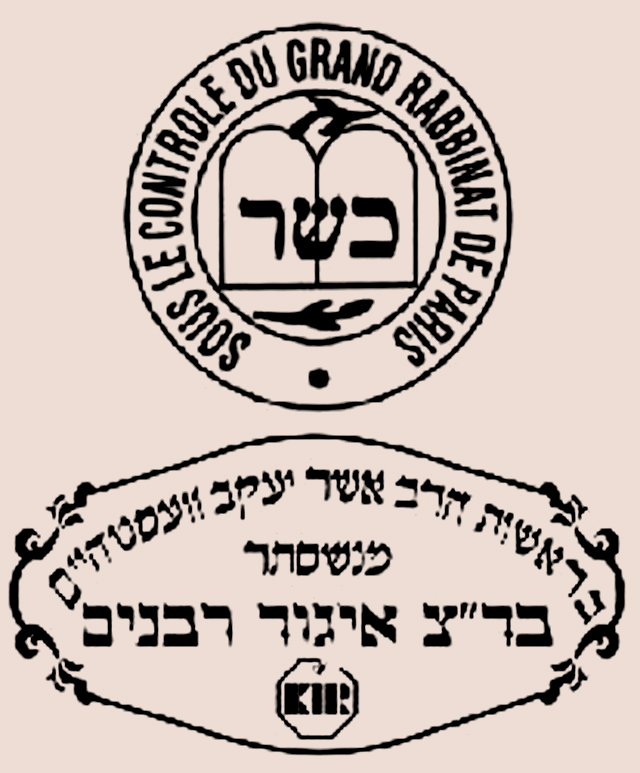 Cachet marquant les vins cashers